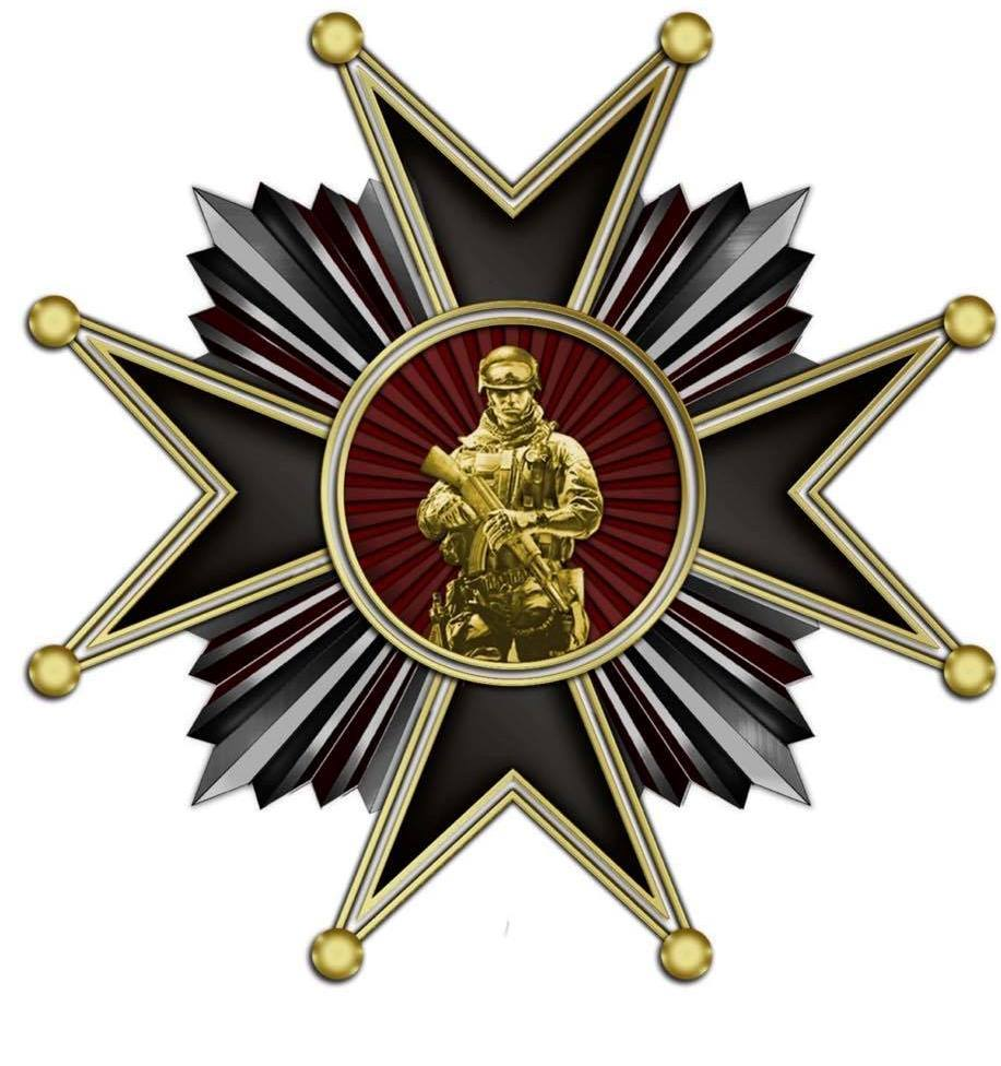 Відзнака Орден Добровольця, чорний чотирилистий хрест на сріблястій зірниці з солдатом-добровольцем в центрі. Вручається посмертно.